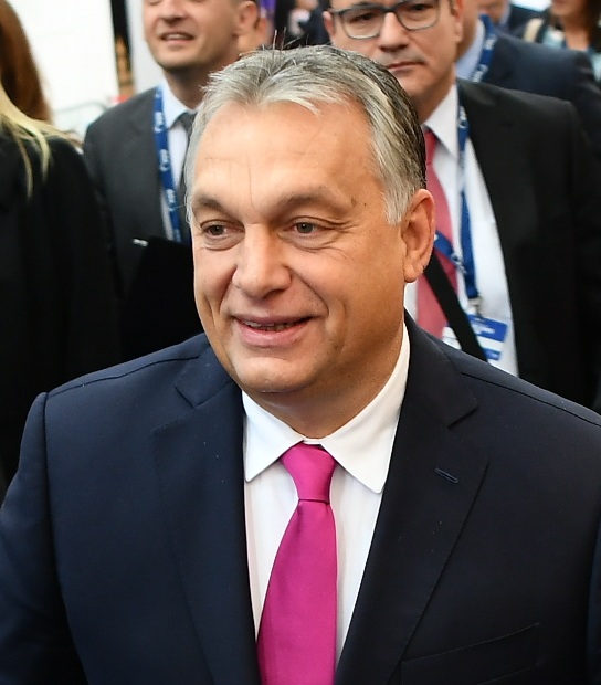 8 November 2018